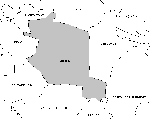 Katastrální členění Břehova